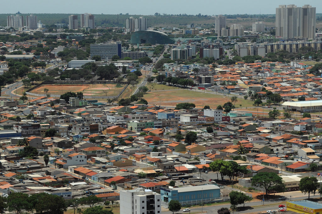 Foto tirada no Setor Sul, ao meio o Setor Oeste, e mais a cima o Setor Central.